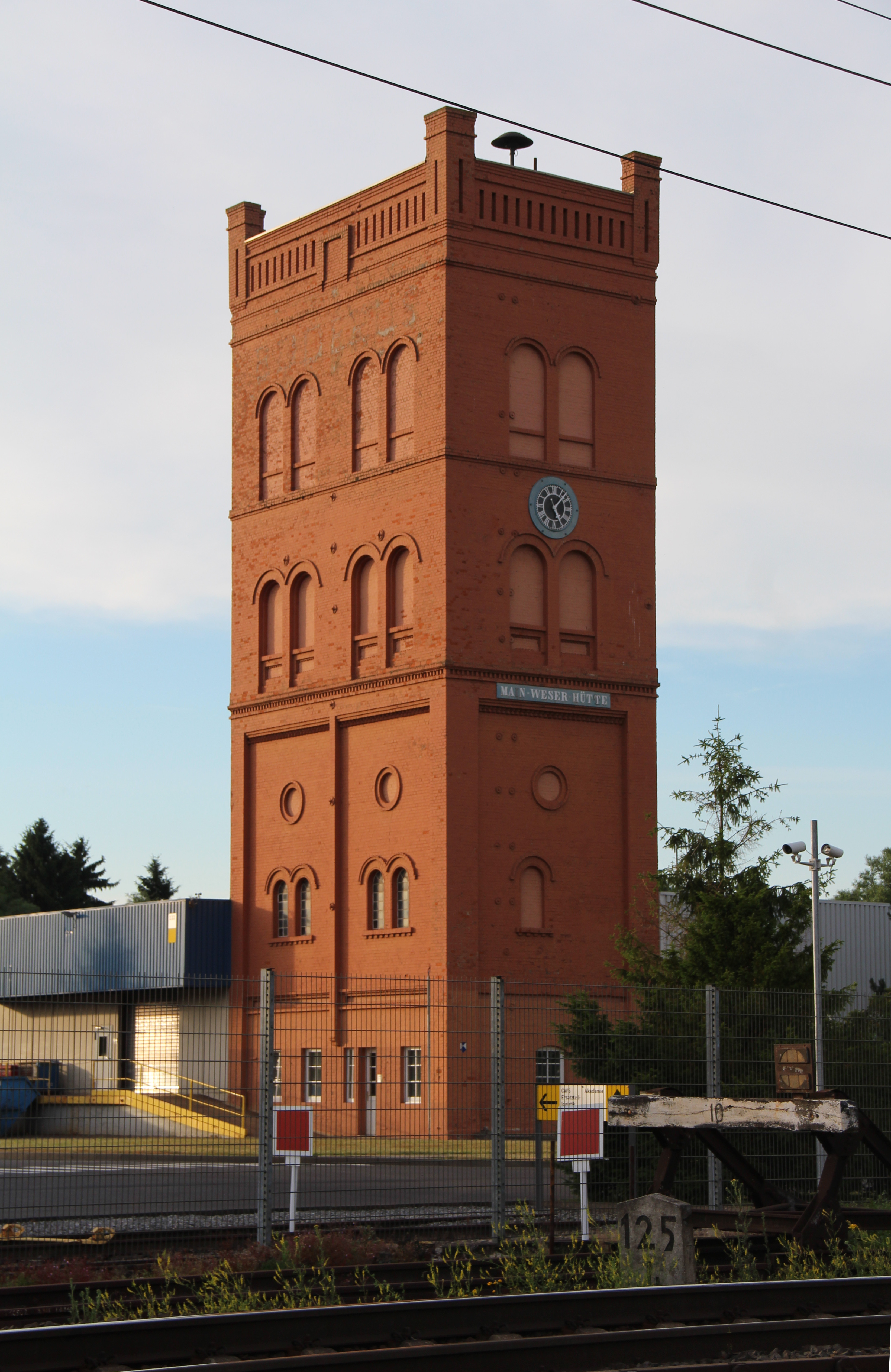 Gichtturm